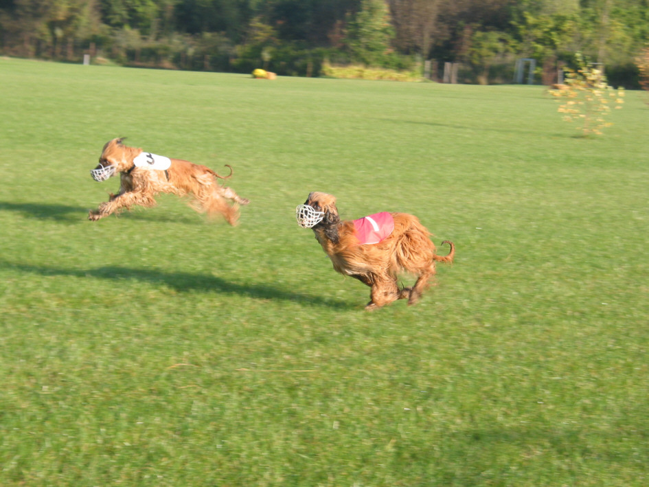 Afghanische Windhunde beim Coursing